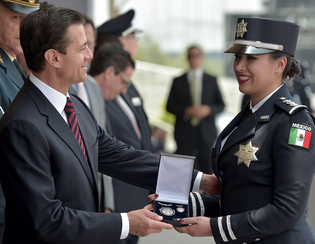 La Inspectora General Sophía Huett recibe la Condecoración al Mérito Social de manos del Presidente de la República durante la celebración del 90 Aniversario de la Policía Federal